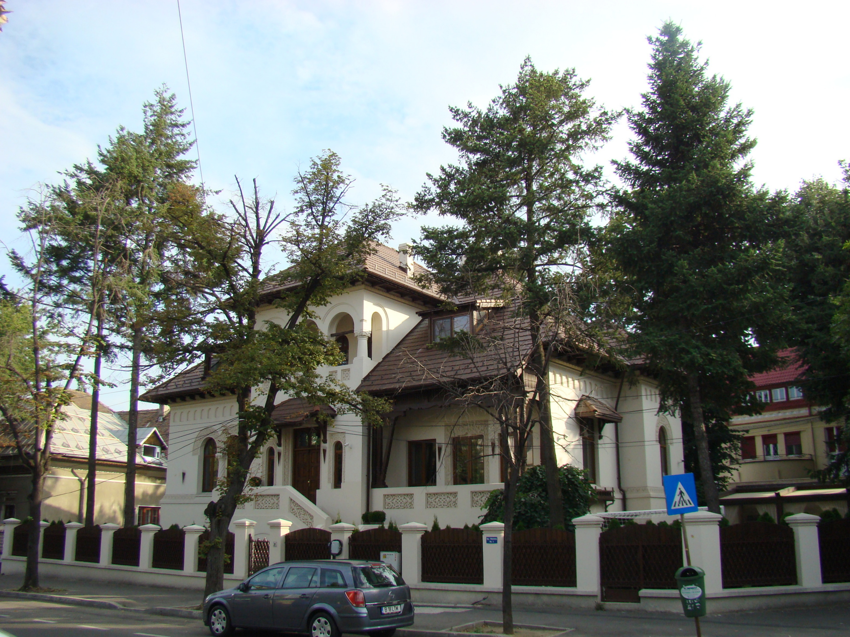 Casă monument istoric, str. Tirana, nr.1